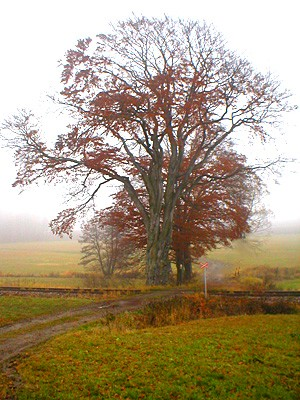 Pěčín-Drážní buk, okres Rychnov nad Kněžnou